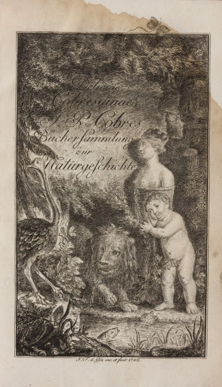 Joseph Paul von Cobres: Deliciae Cobresianae. Büchersammlung zur Naturgeschichte. Bd. 1. Im Selbstverlag des Verfassers, Augsburg, Titelblatt, Ausschnitt